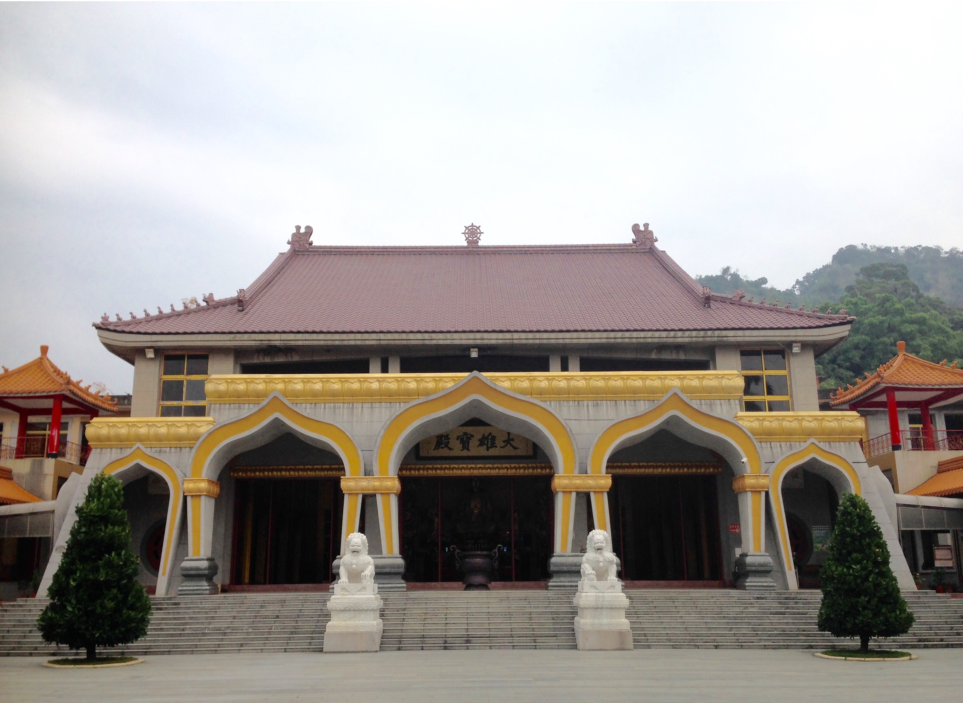 觀音山大覺寺的大雄寶殿